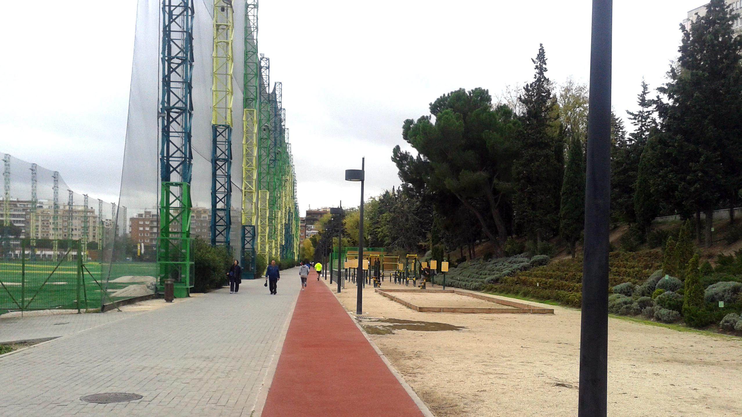 La Dirección General de Control de la Edificación del Área de Desarrollo Urbano Sostenible ha concedido, el pasado 5 de diciembre, la Licencia Urbanística municipal que permitirá iniciar los trabajos de demolición de las instalaciones de golf existentes sobre la parcela del Tercer Depósito del Canal de Isabel II en la avenida de Filipinas, en el distrito de Chamberí.